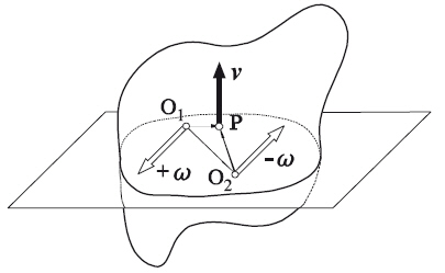 Cinemática del Sólido Rígido